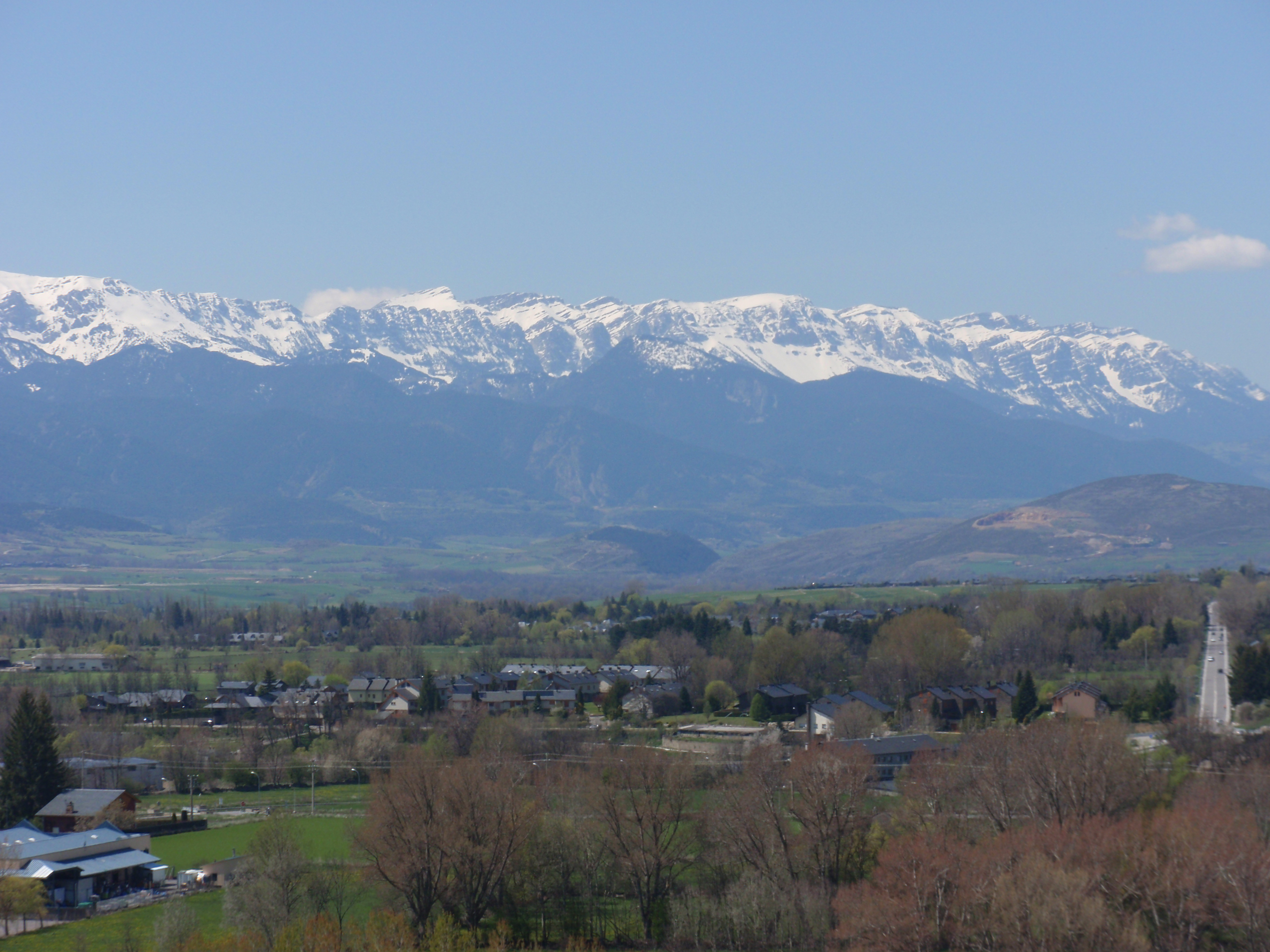 El Cadí des de Ger This is a a photo of a natural area in Catalonia, Spain, with id: ES510202